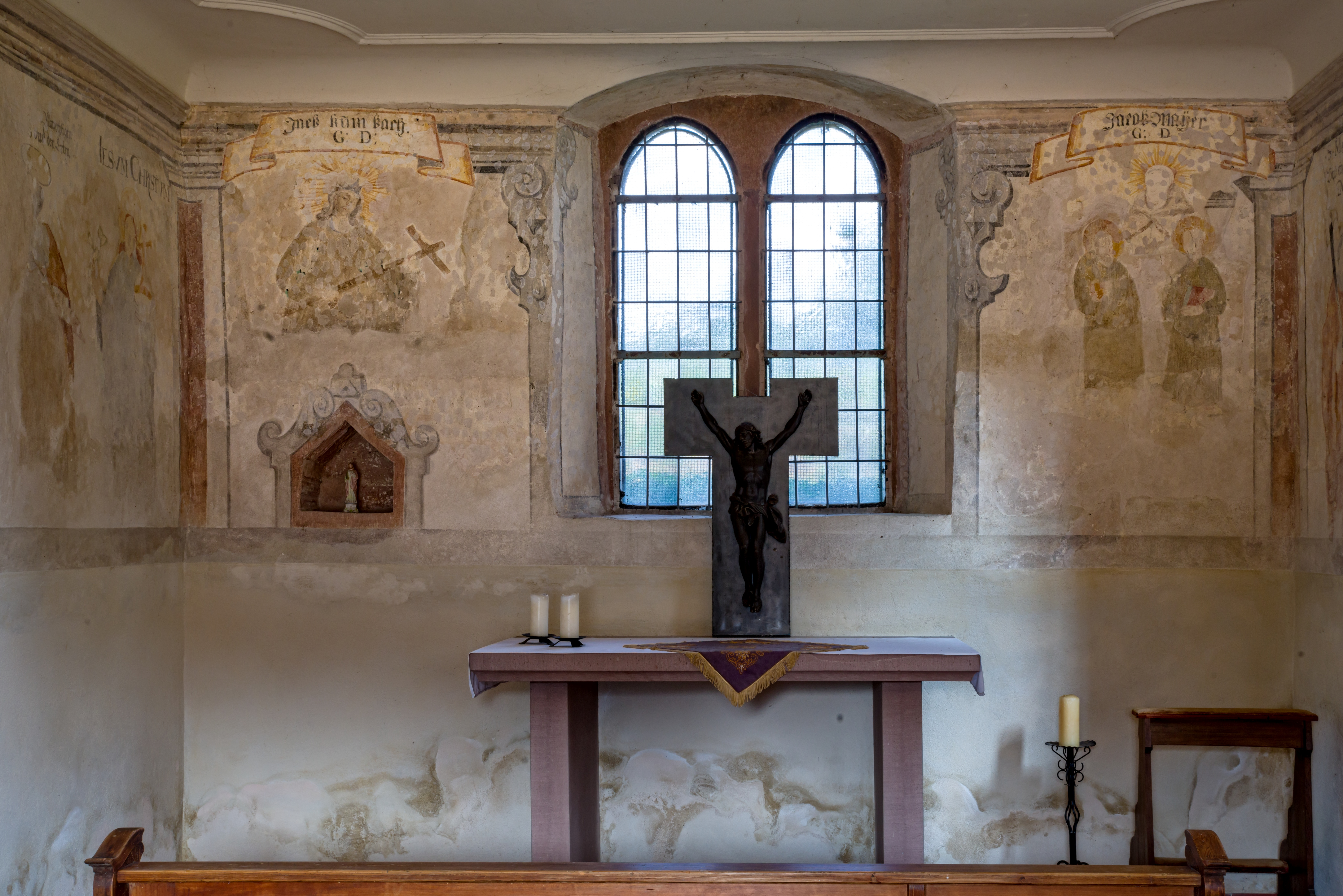 Bilder aus Staufen im Breisgau, die St. Magdalenenkapelle